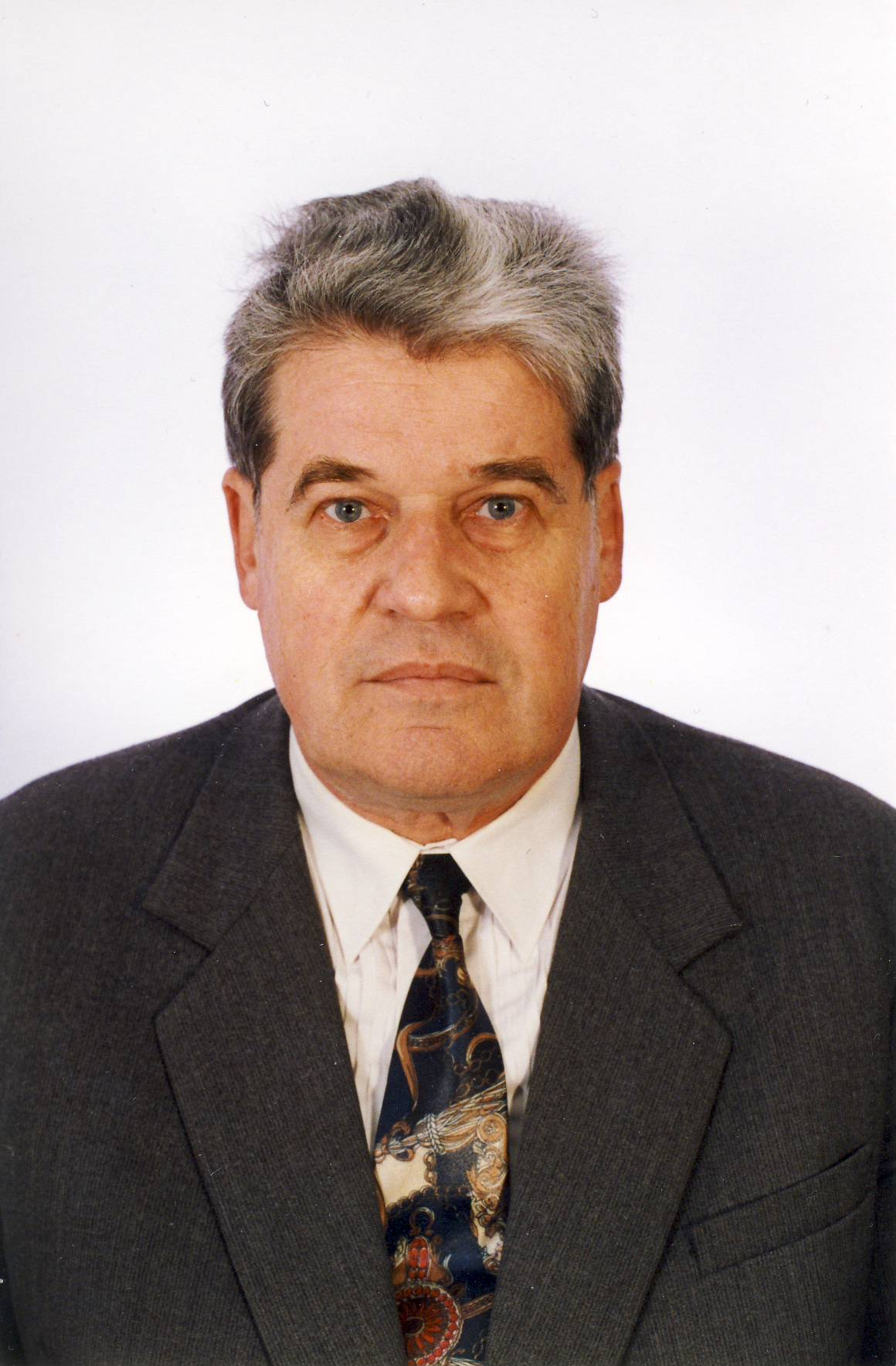 Lembit Valt